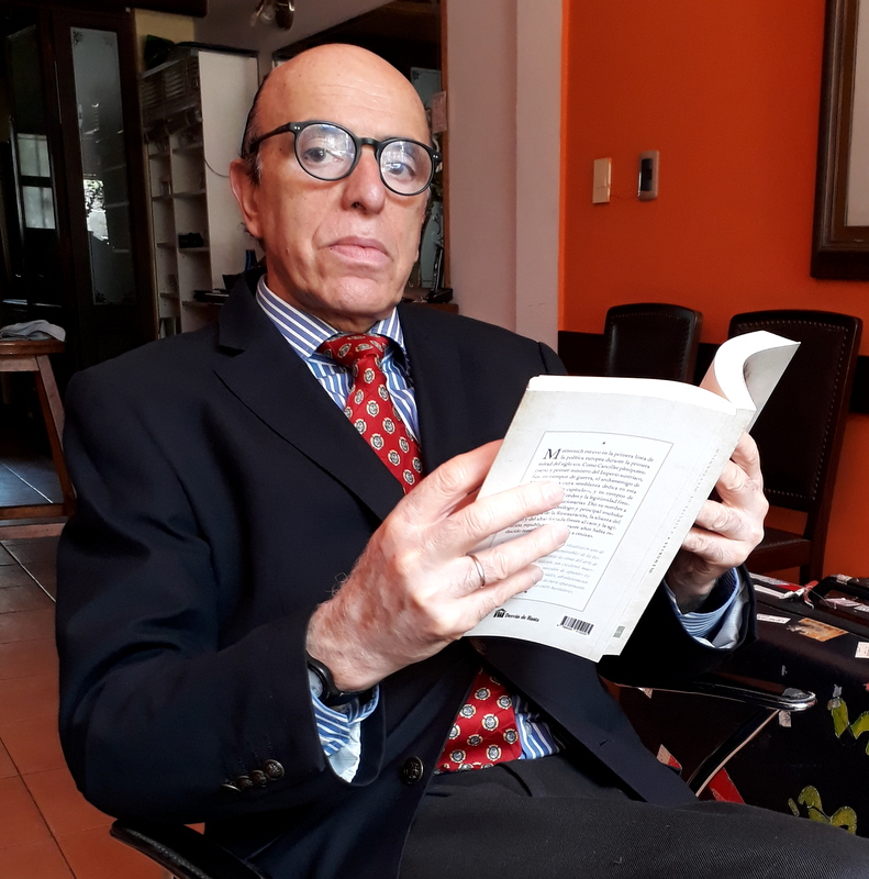 El hábito de la lectura